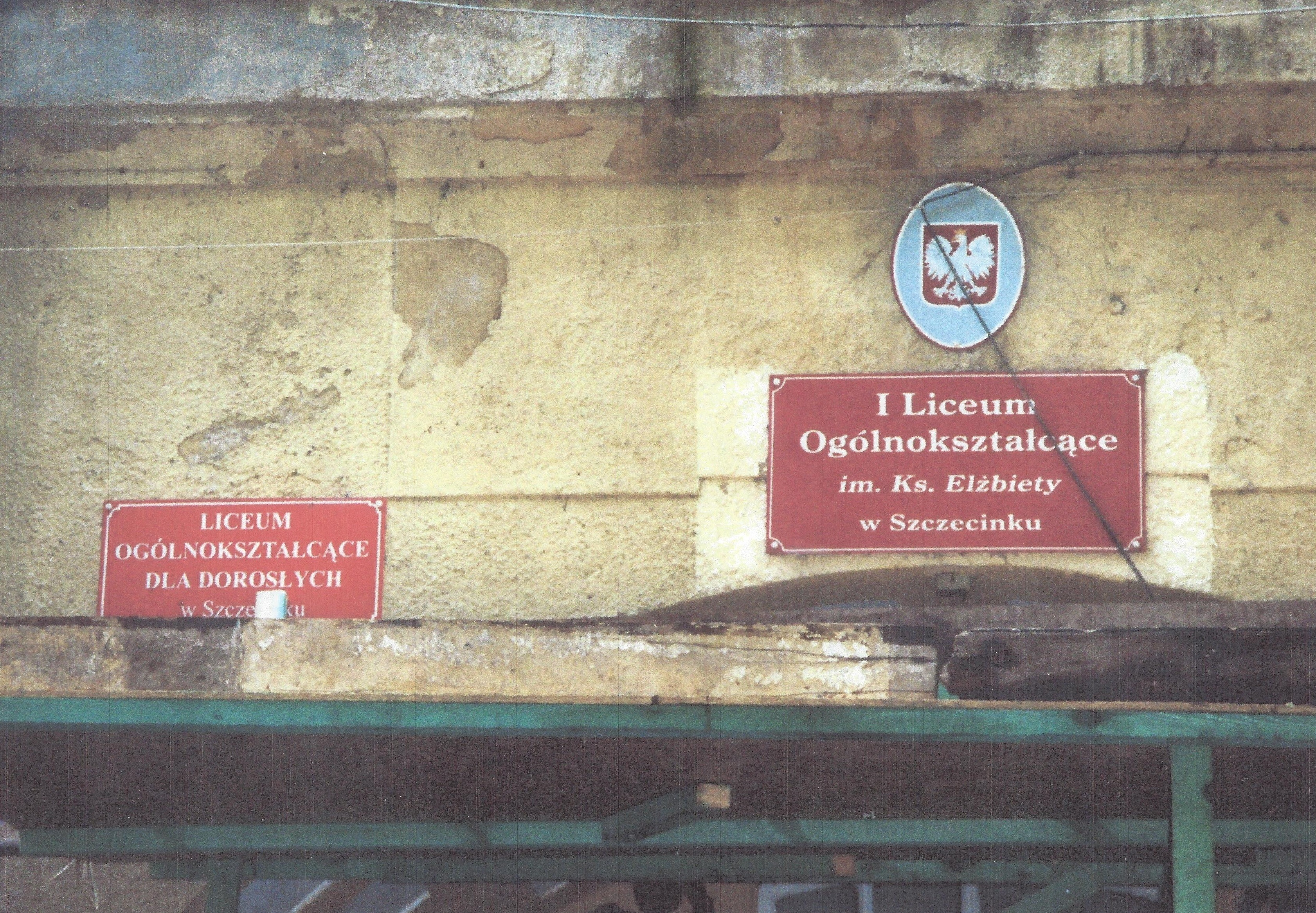 Fürstin-Elisabeth-Schule (die frühere Fürstin-Hedwig-Schule in Szczecinek.